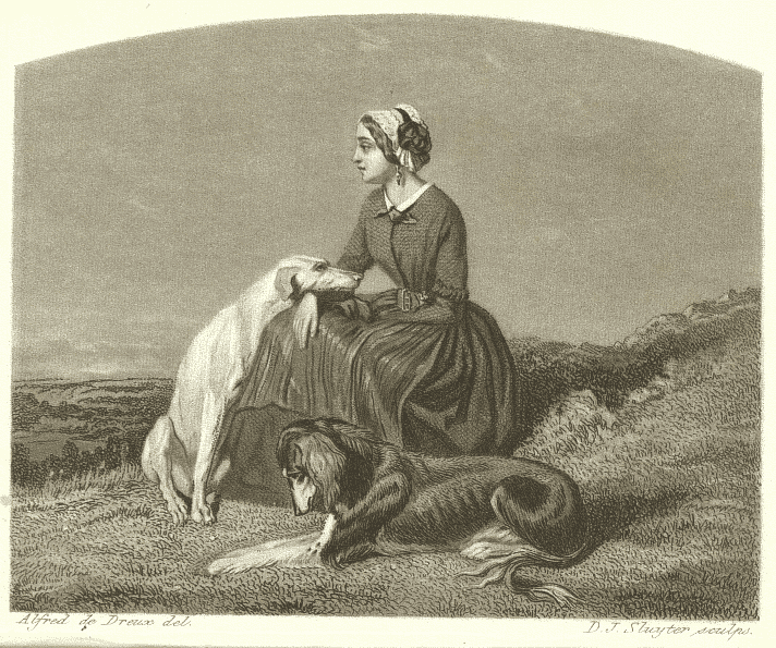 Deze afdruk van een staalgravure komt uit de "Almanak voor het Schoone en Goede", 1853. Gedrukt bij C.A. Spin & Zoon. Aan de onderzijde van de gravure staat rechts de naam van de graveur: D.J. Sluyter, sculp. Linksonderaan staat de naam schilder van het schilderij dat als voorbeeld heeft gediend: Alfred de Dreux del. Graveur : Dirk Jurriaan Sluyter (1811-1886) ([1])